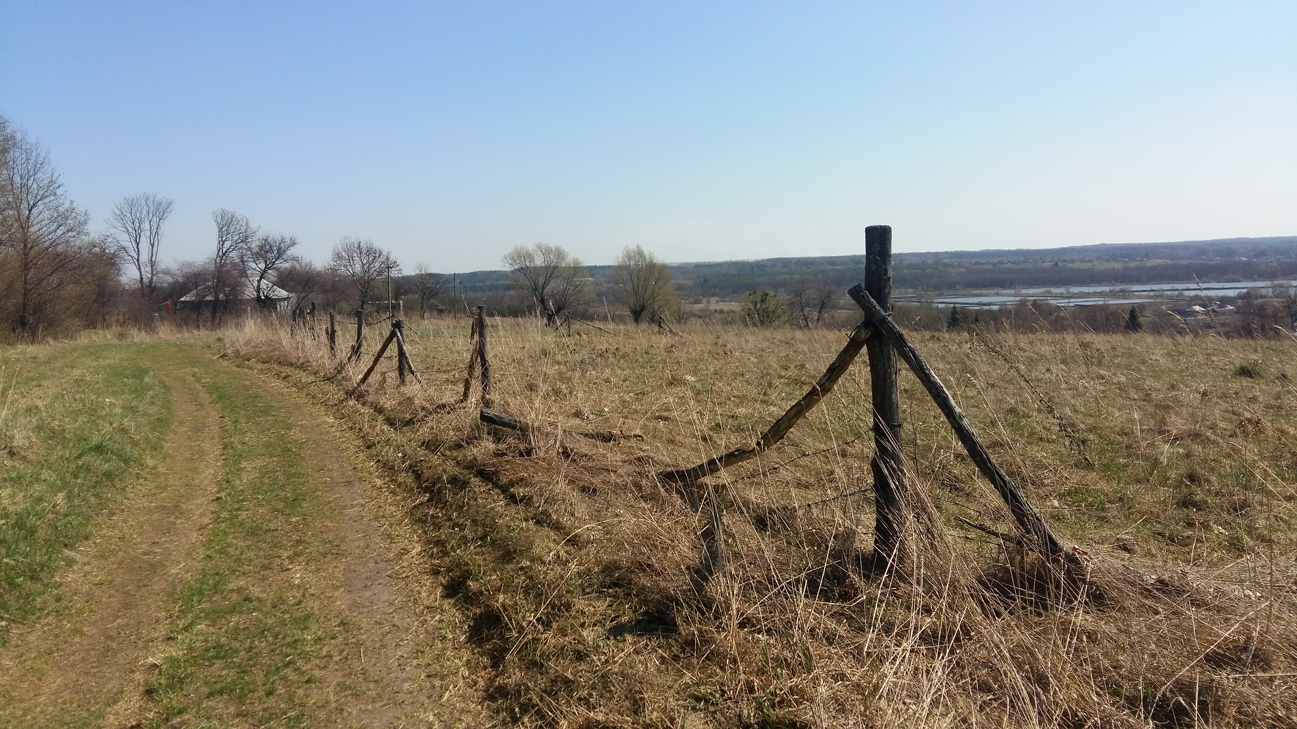 Поле в селе Викторово